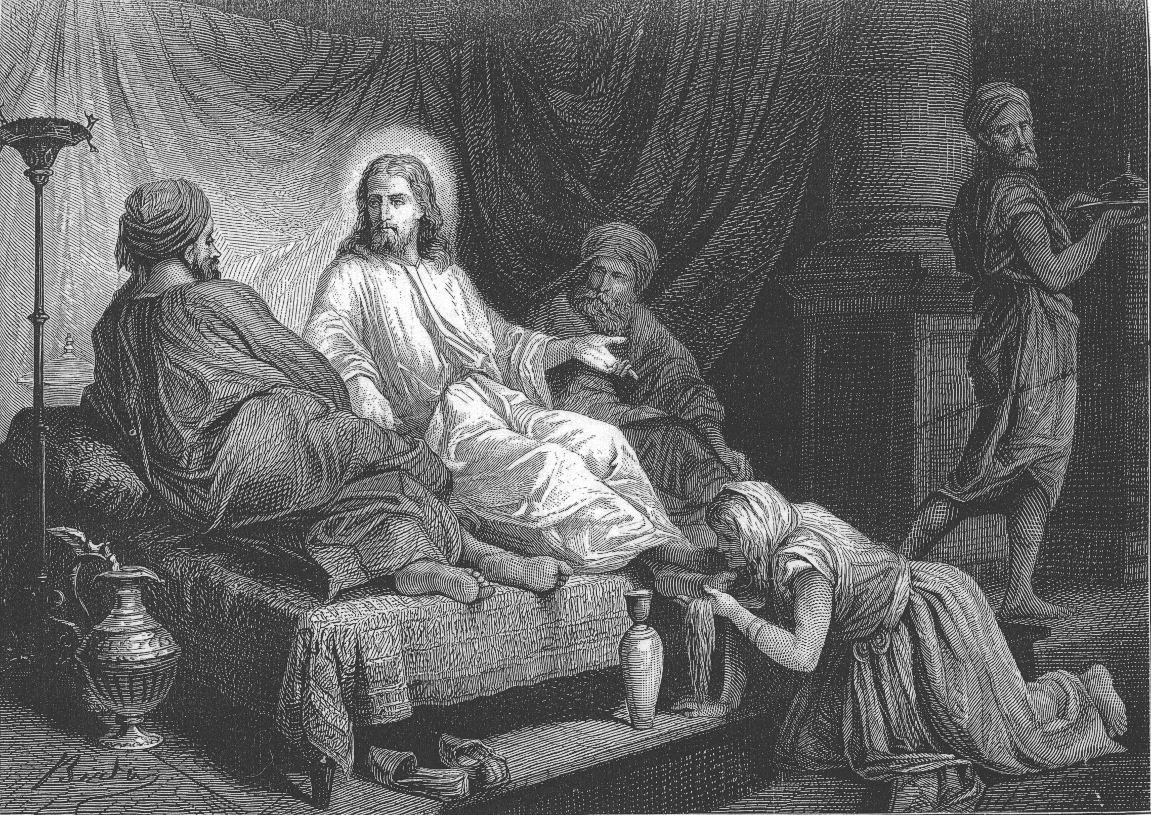 Jesus Anointing